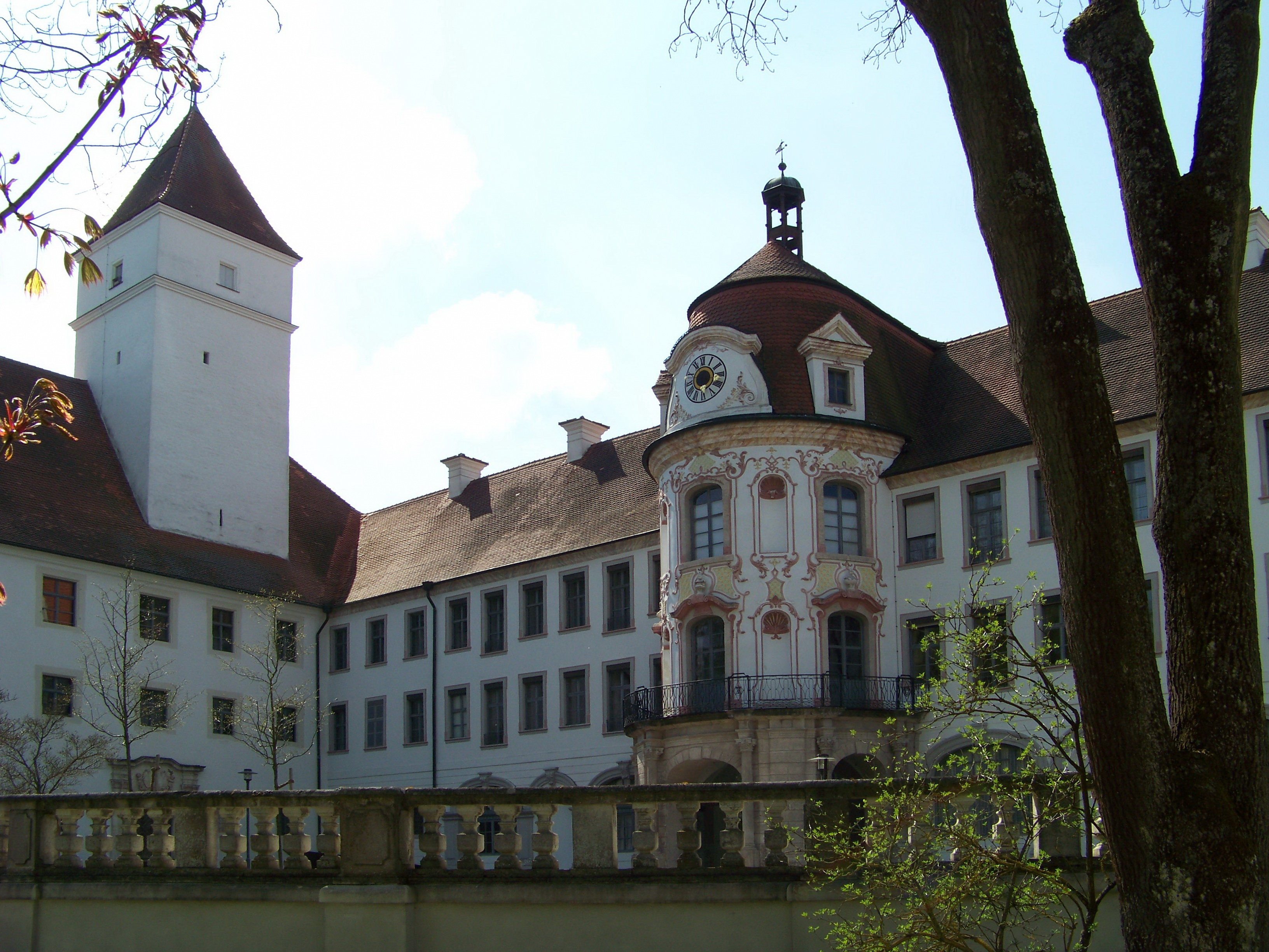 Alteglofsheim. Am Schlosshof 1. Schloss, jetzt Bayerische Musikakademie, 1200- 1795.